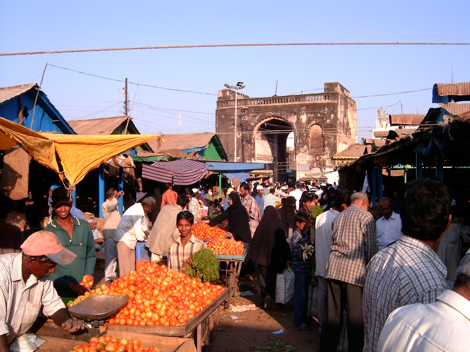 Mir Alam Mandi (A vegetable market in Hyderabad)